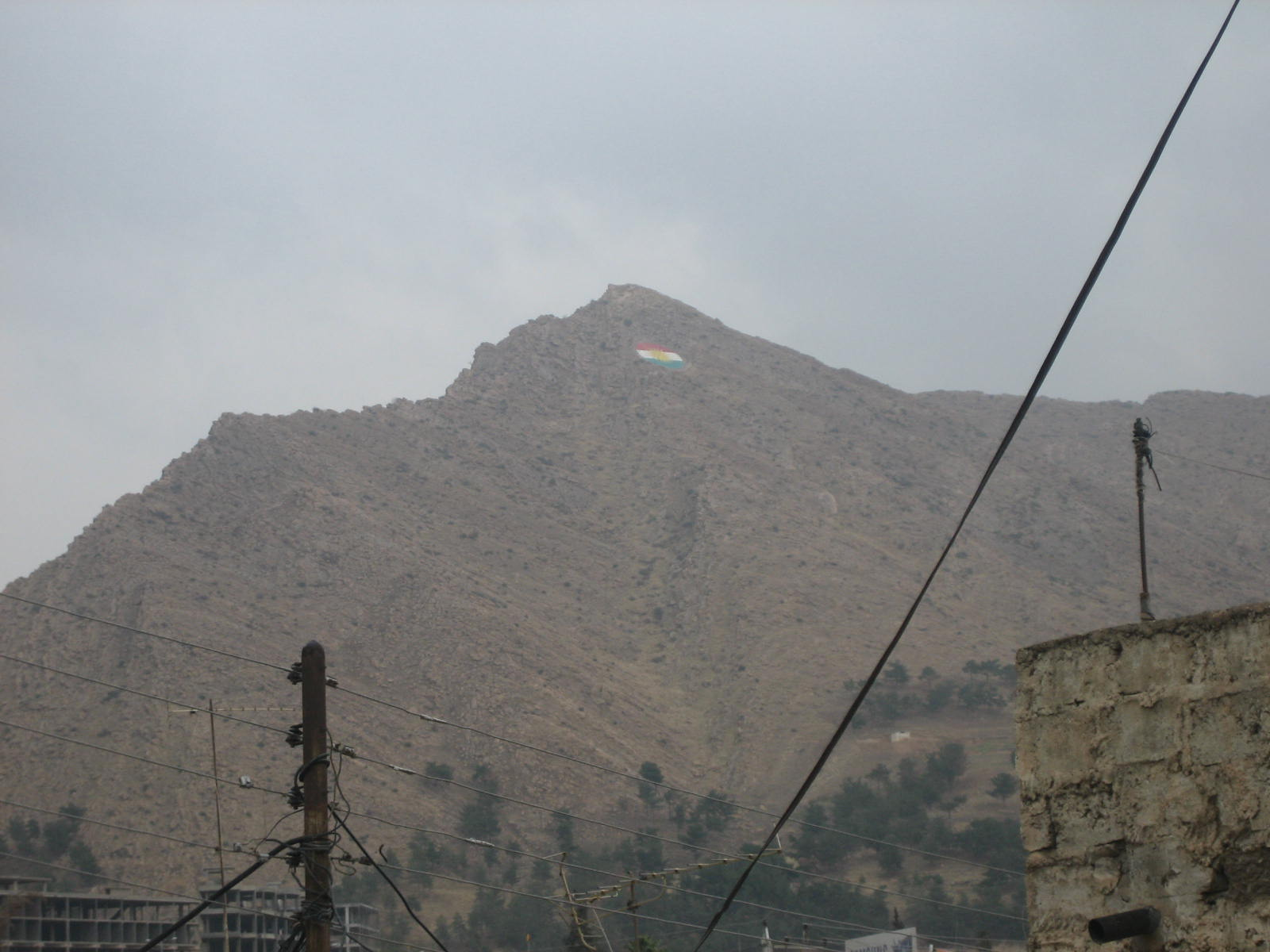 صورة لإحدى الجبال المطلة على مدينة دهوك ويتضح في أعلى جبل رسم لعلم إقليم كردستان